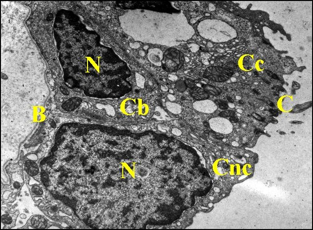 Epithélium normal de la caisse du tympan